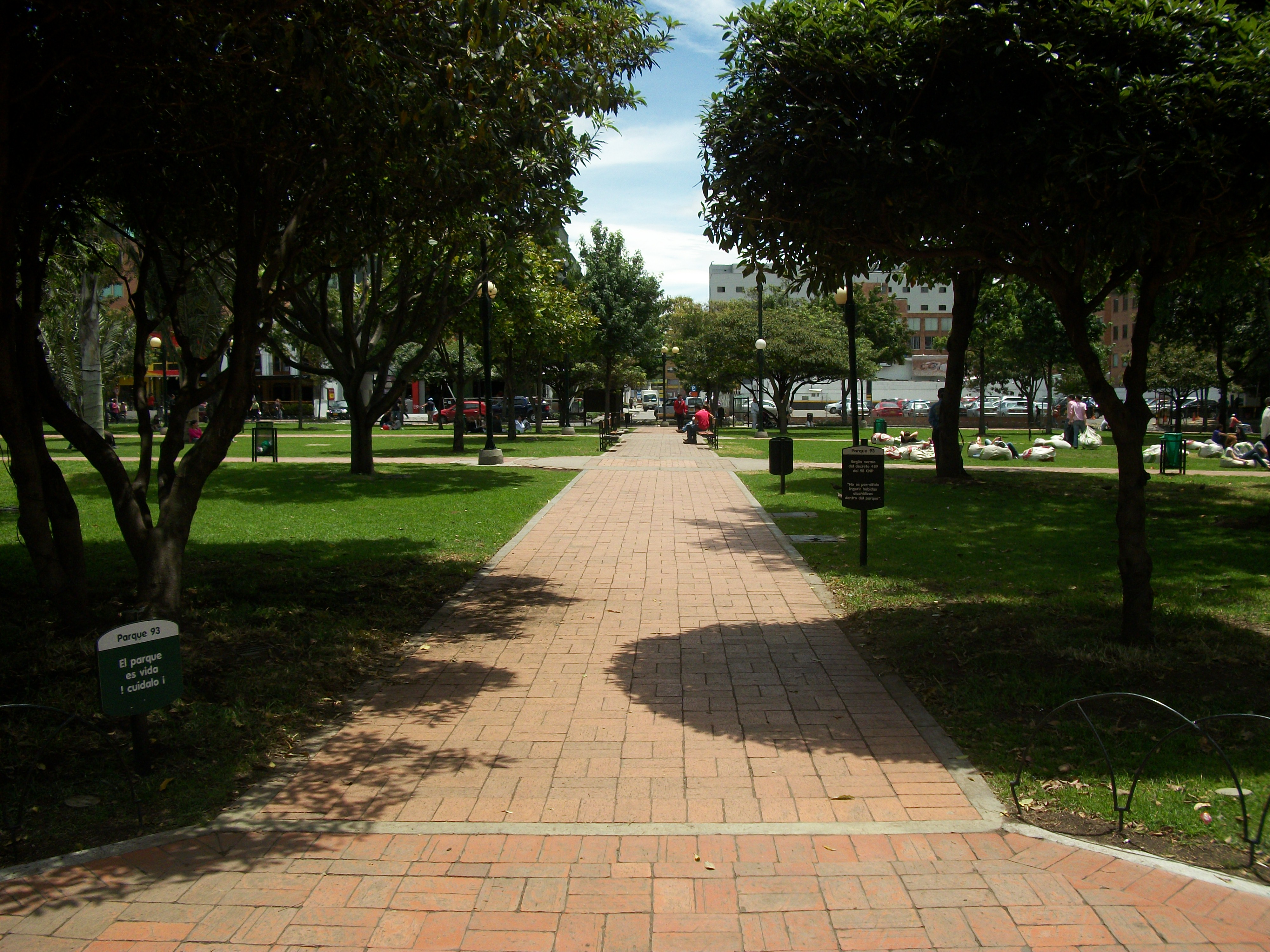 Camino dentral del parque de la 93 en Bogotá, visto desde el costado norte.